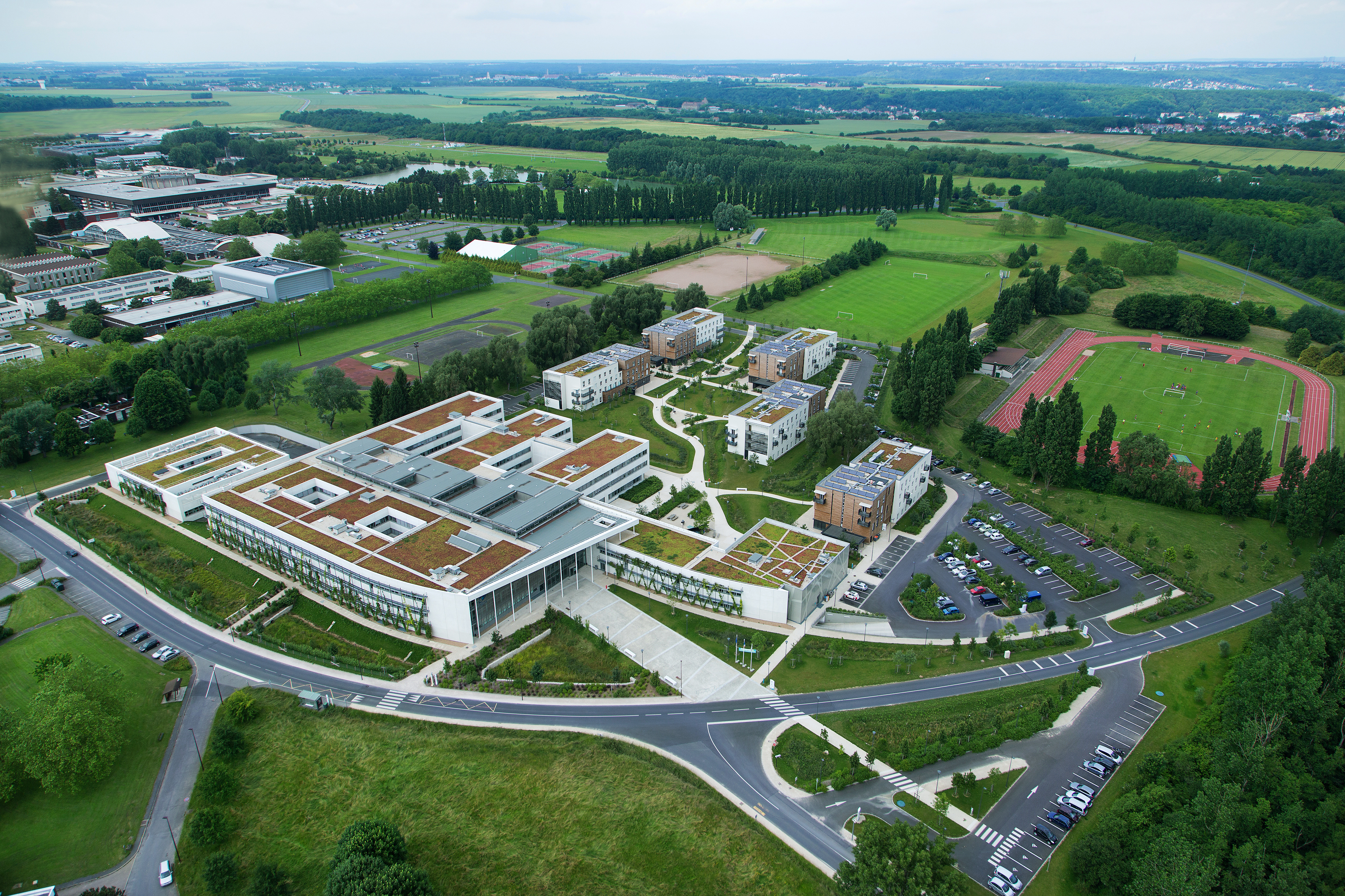 Vue aérienne du campus de l'Ecole polytechnique.